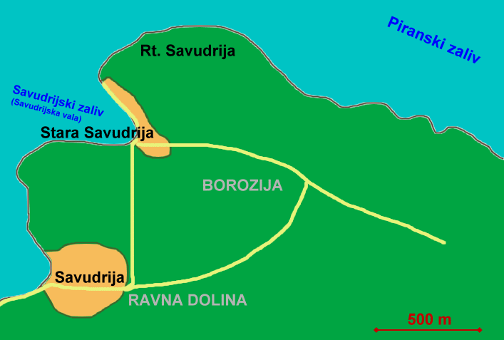 Prikaz območja Savudrijskega polotoka. vir: zemljevid 1:25.000